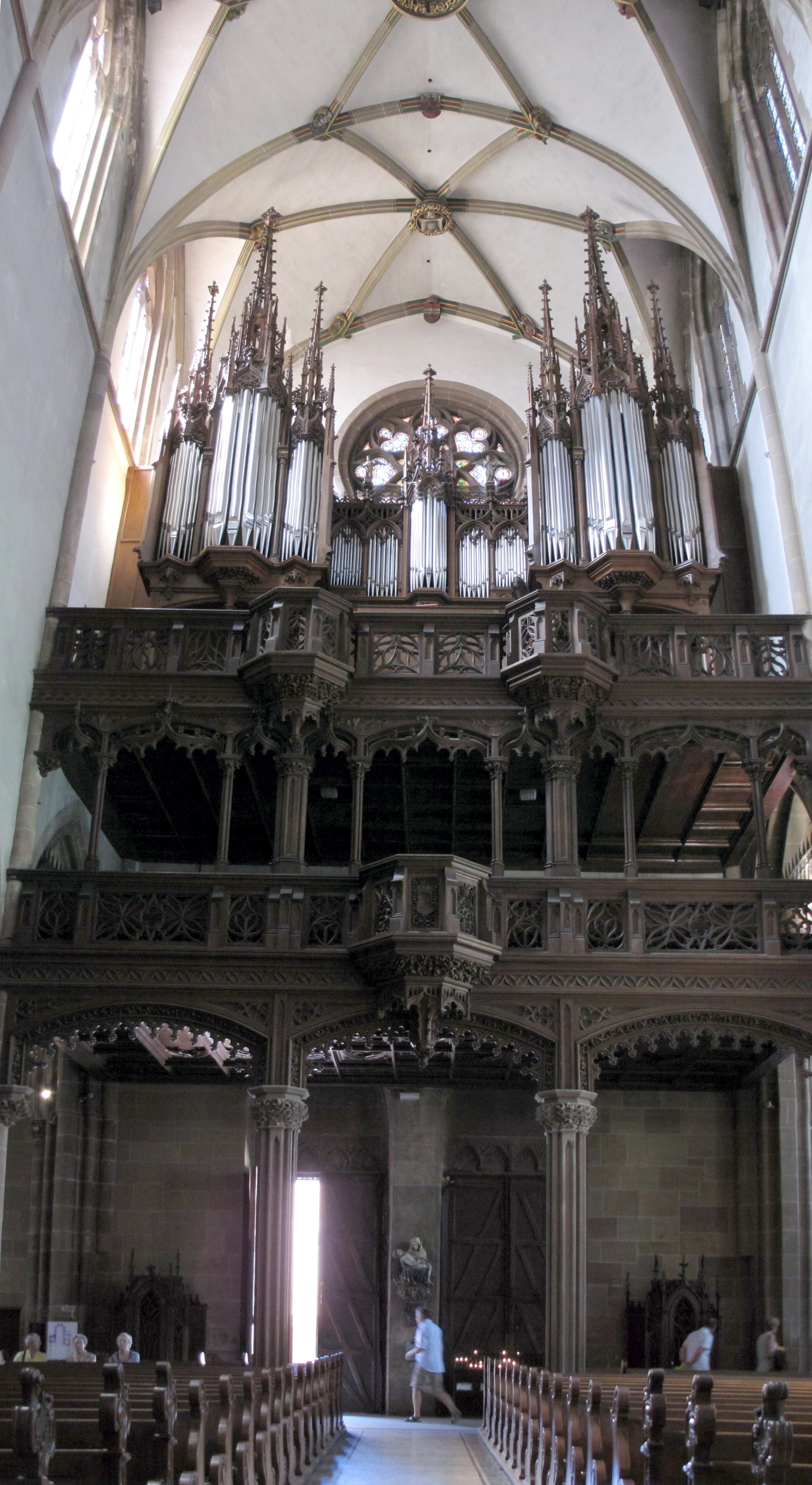 Alsace, Haut-Rhin, Collégiale Saint-Thiébaut de Thann (PA00085696, IA00024314). Orgue de tribune Rinckenbach-Klem (1885): This object is classé Monument Historique in the base Palissy, database of the French furniture patrimony of the French ministry of culture, under the references PM68000948, IM68000861 and buffet PM68000396 buffet.